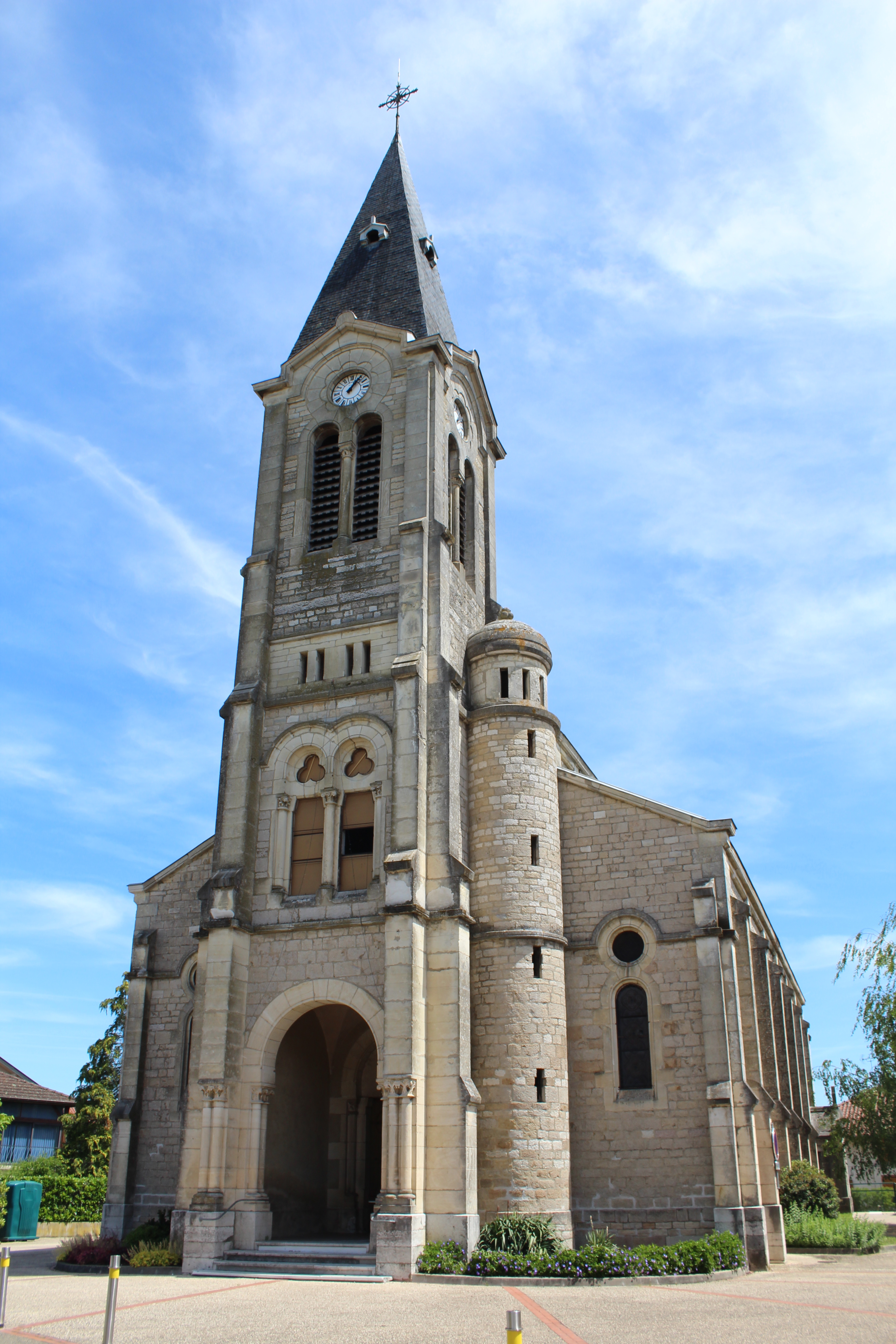 Église Saint-Jean-Baptiste de Cras-sur-Reyssouze.